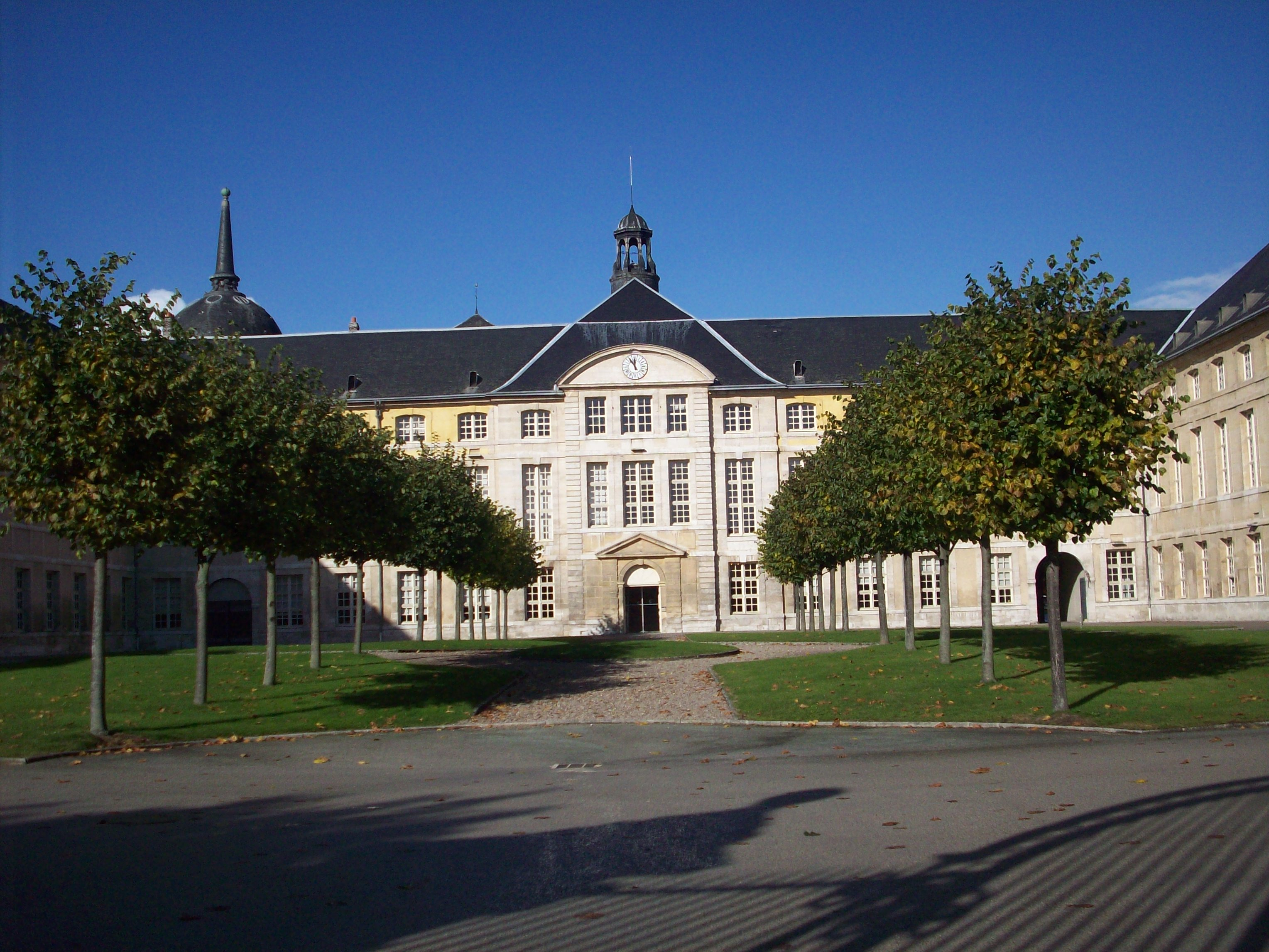 Ancien hôtel-Dieu, aujourd'hui préfecture de la Seine-Maritime et de la région Haute-Normandie, à Rouen.